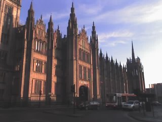 Marischal College as seen from Upperkirkgate in Aberdeen, Scotland.